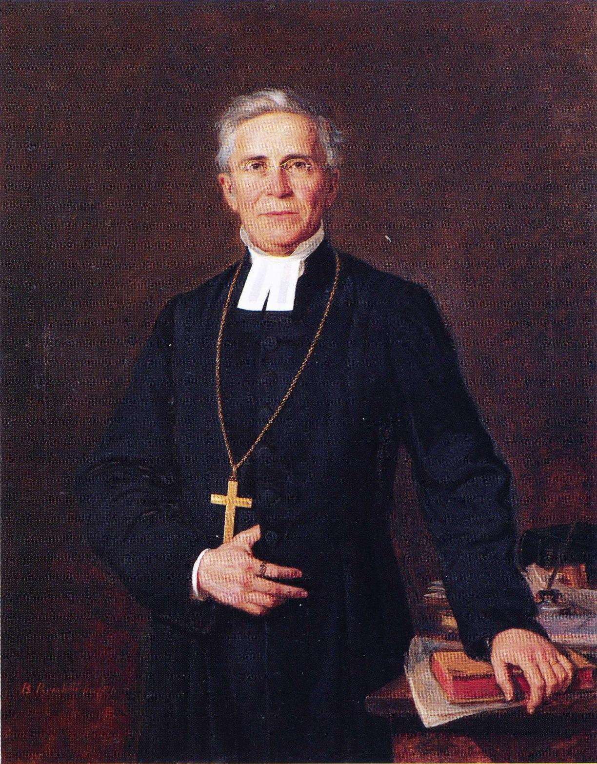 Porvoon piispa Frans Ludvig Schauman (1810–1877). Muotokuva kuuluu Helsingin yliopiston kokoelmiin.